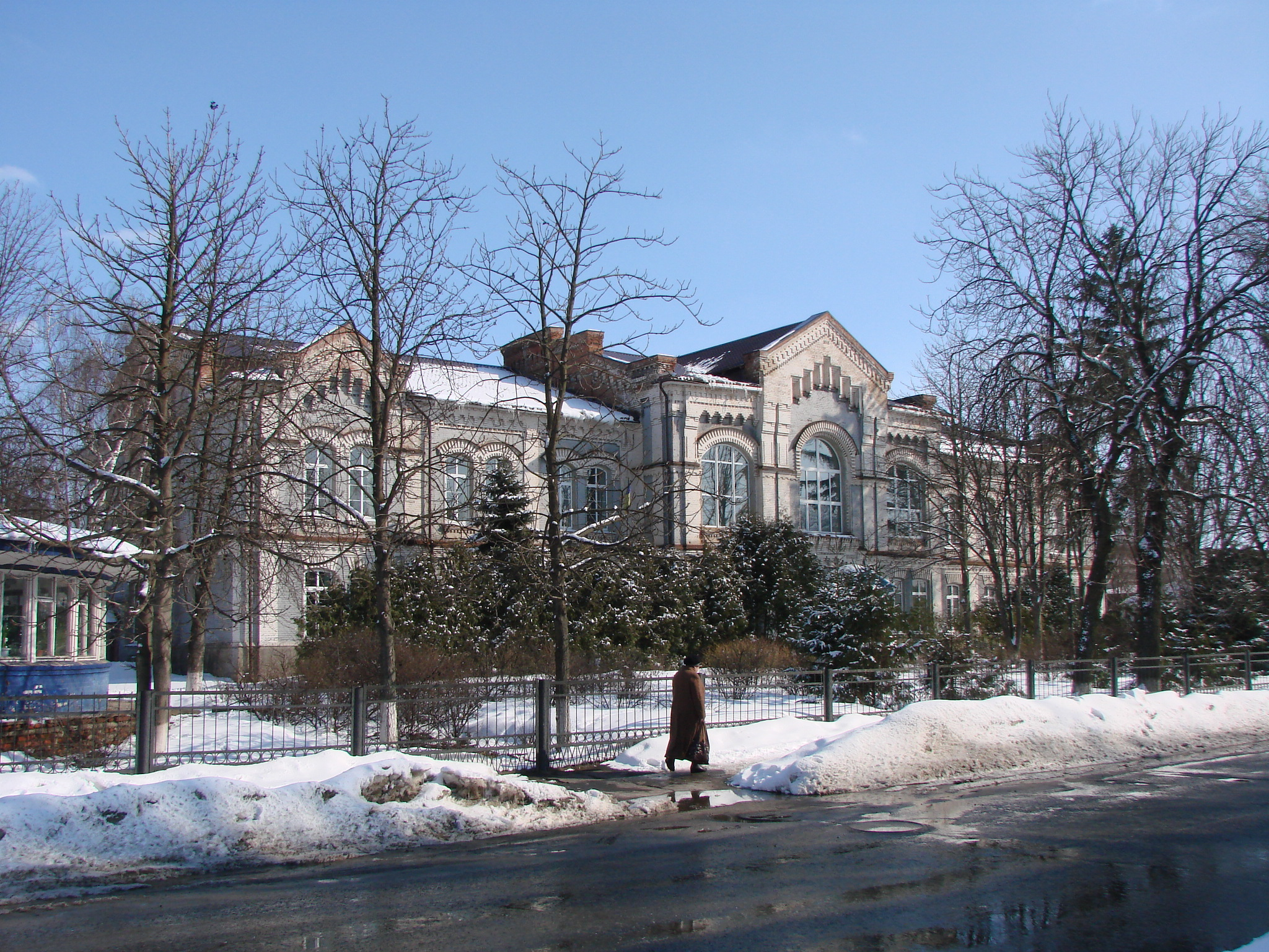 Будинок колишньої чоловічої гімназії, в якій навчався Антоненко-Давидович Б.Д. – український письменник, Охтирка, Вул. Фрунзе, 4